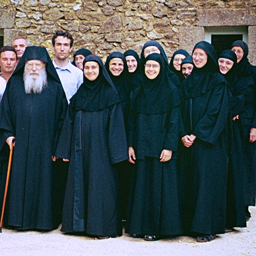 Père Placide avec les sœurs de Solan.